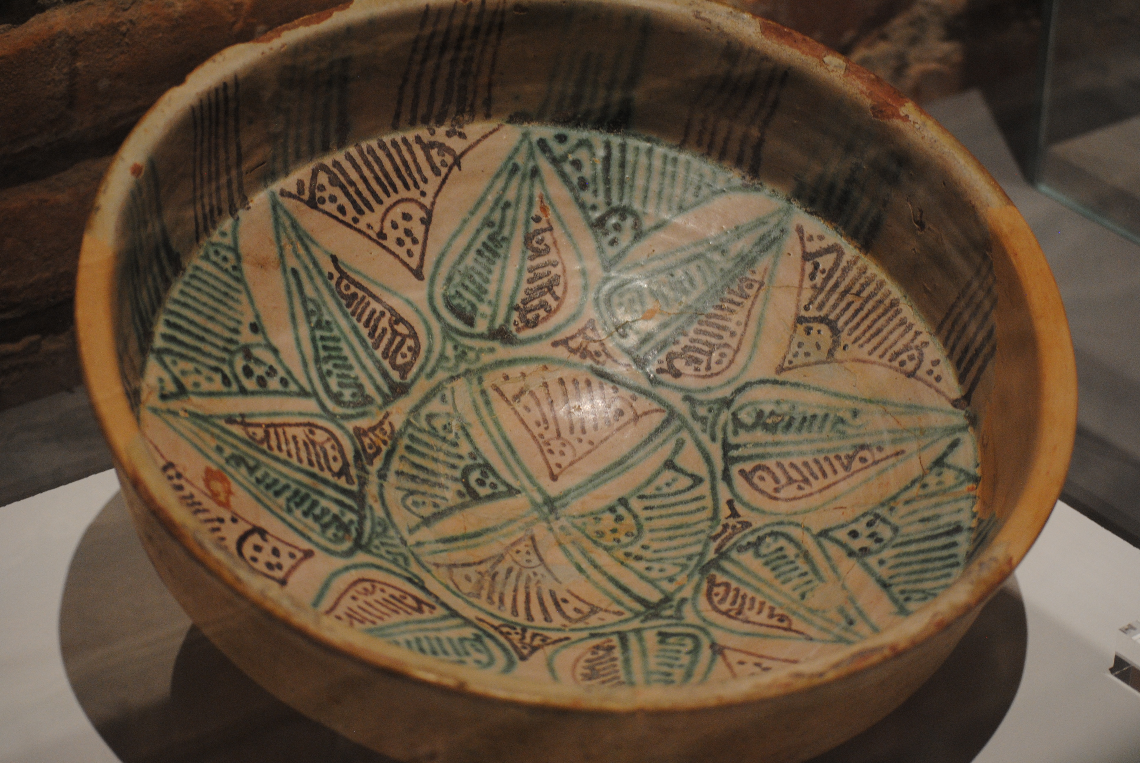 Catino in maiolica policroma (vert y manganeso) usata come bacino ceramico - importata da Palma di Maiorca (Spagna) nel primo quarto dell'XI secolo (chiesa di San Piero a Grado, Pisa) - Museo nazionale di San Matteo.